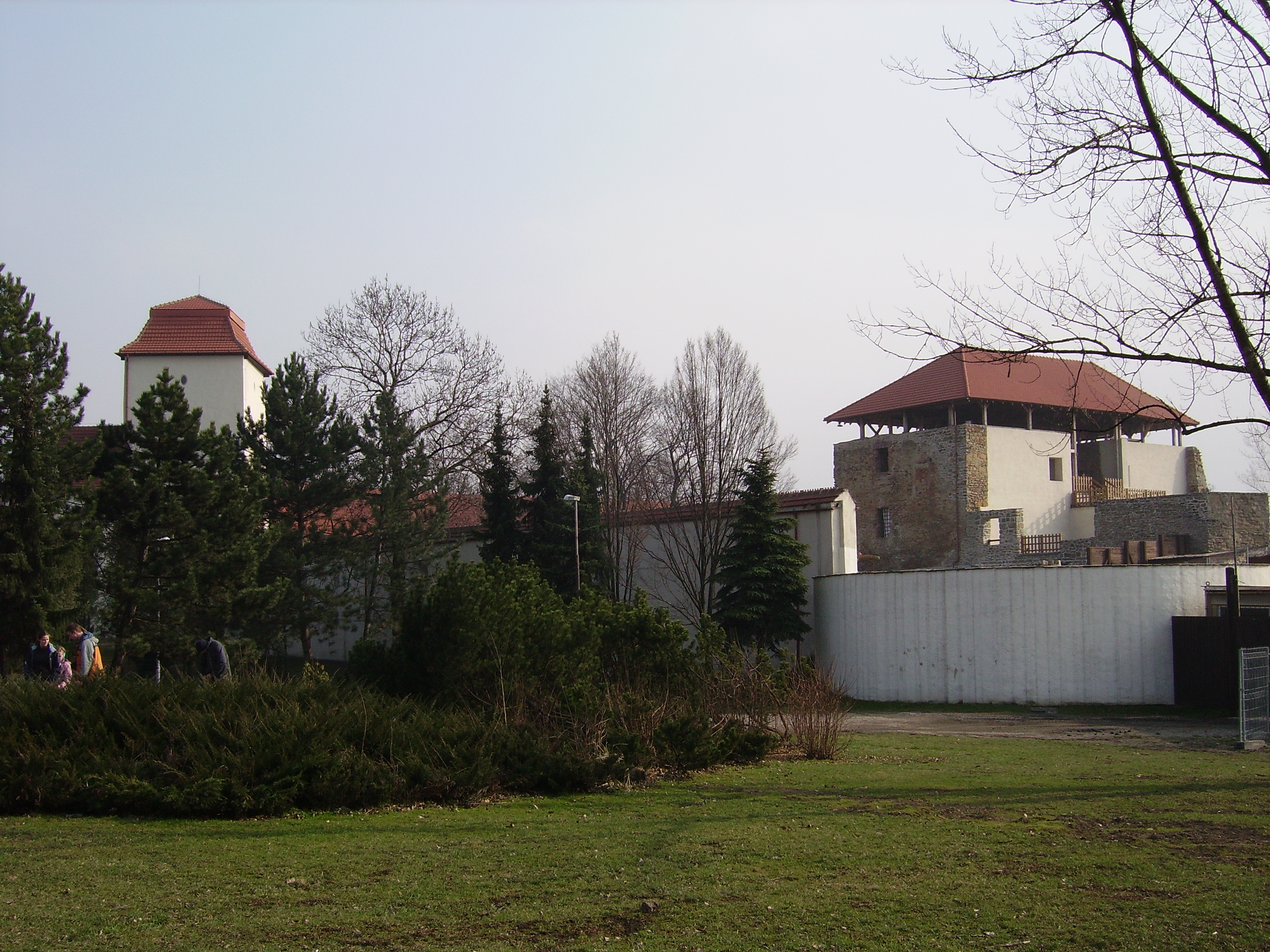 Slezskoostravský hrad; vstupní brána (vlevo) a hradní palác